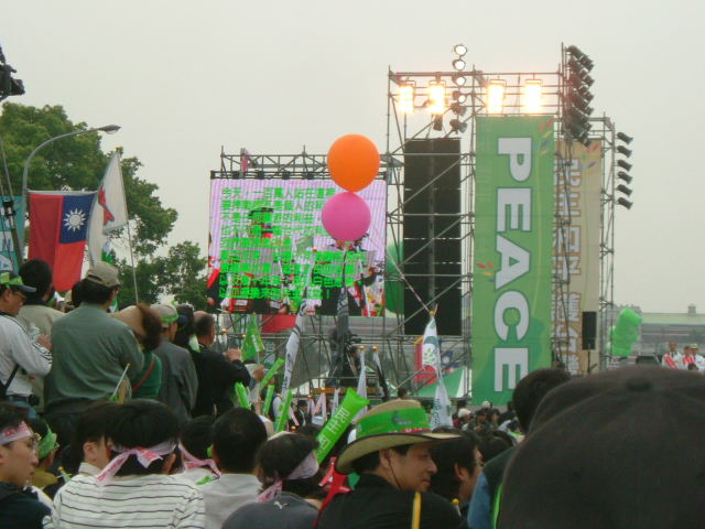 2005年三二六護臺大遊行。